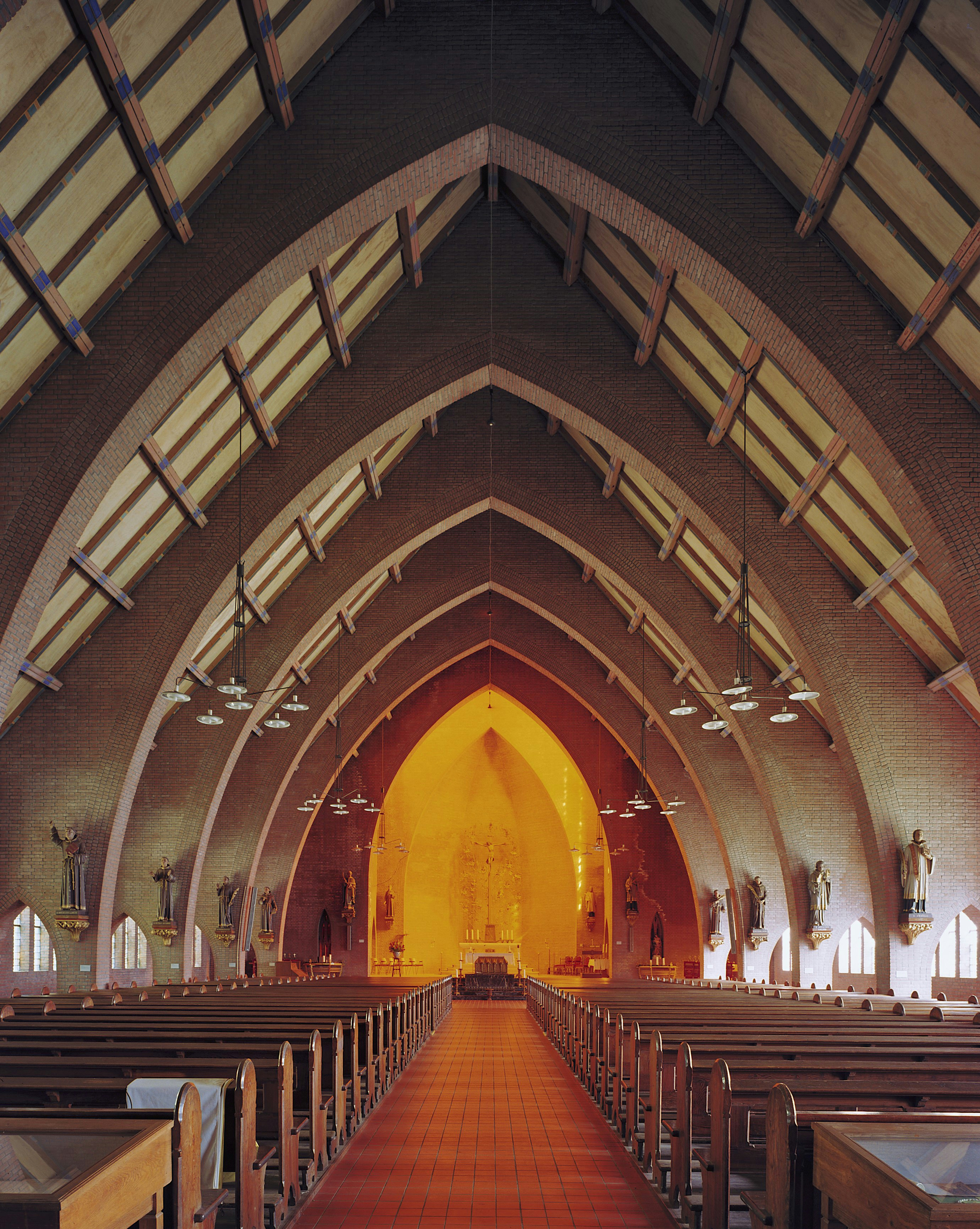 H.H. Martelaren van Gorcum: Interieur, overzicht middenschip naar het oosten